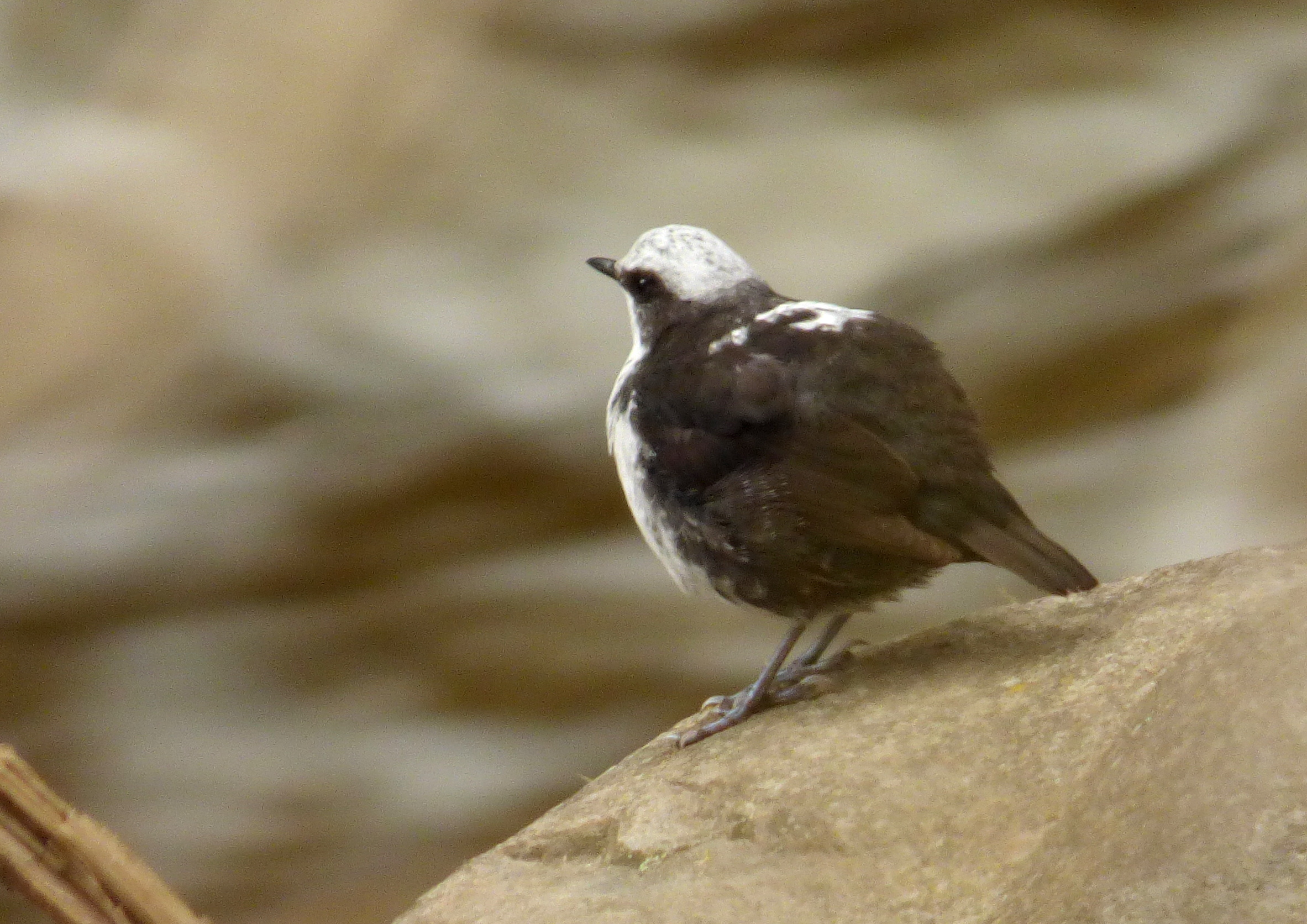 Cinclus lecocephalus (Mirlo acuático)